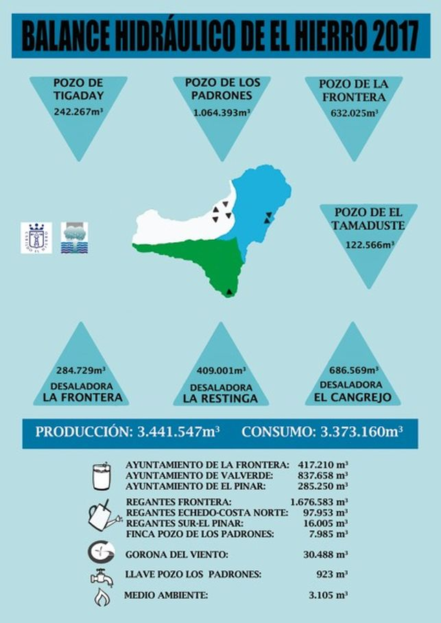 uso y obtención de agua en la isla de el hierro.